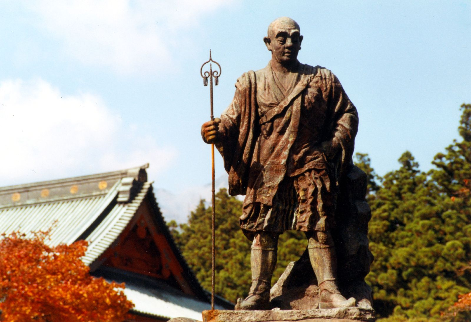 Nikko